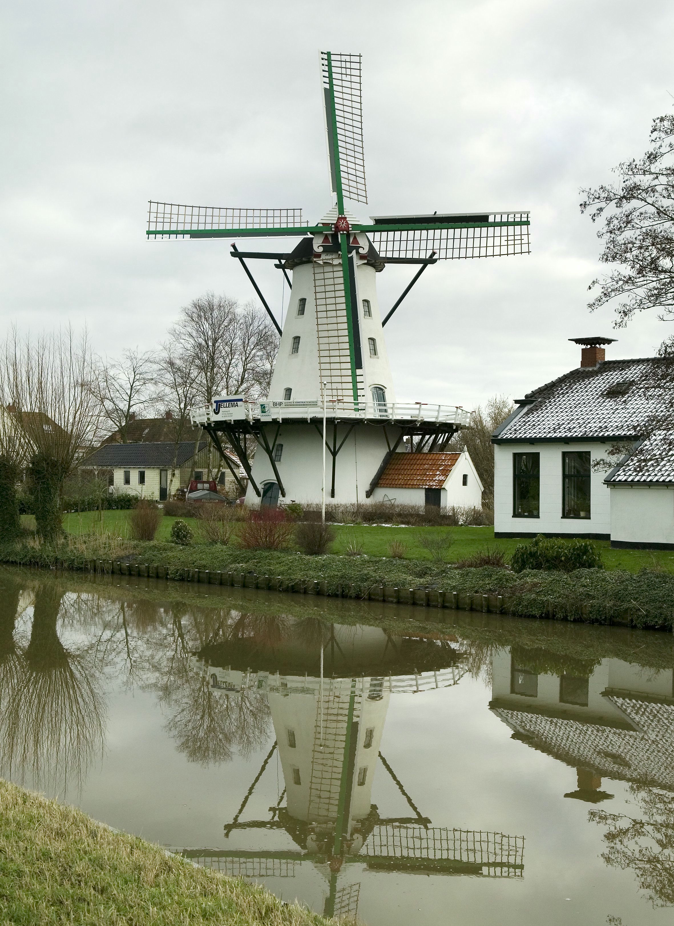 De Widde Meuln: Overzicht molen met de ligging in de omgeving